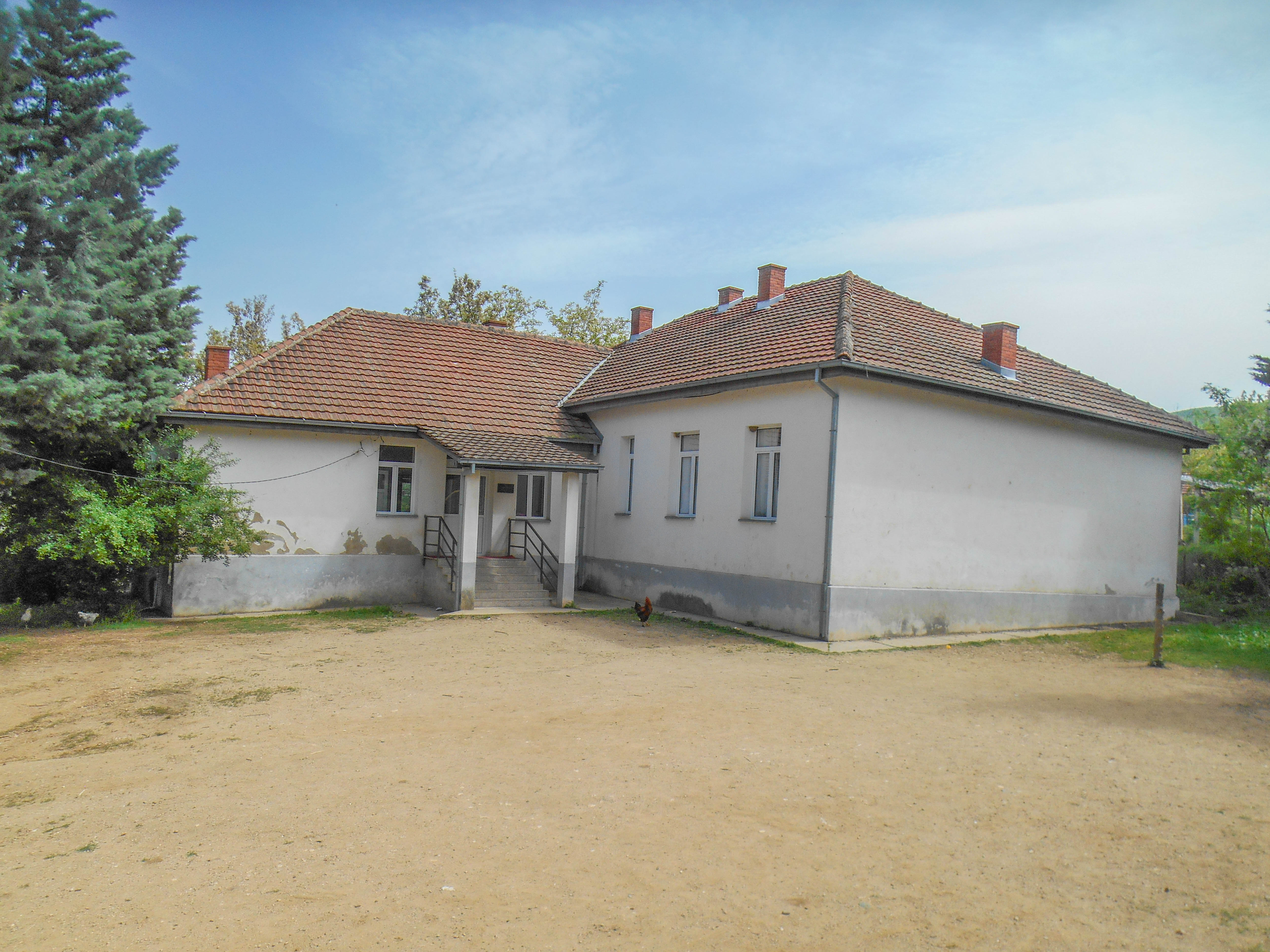 Основно училиште „Гоце Делчев“ - Дукатино